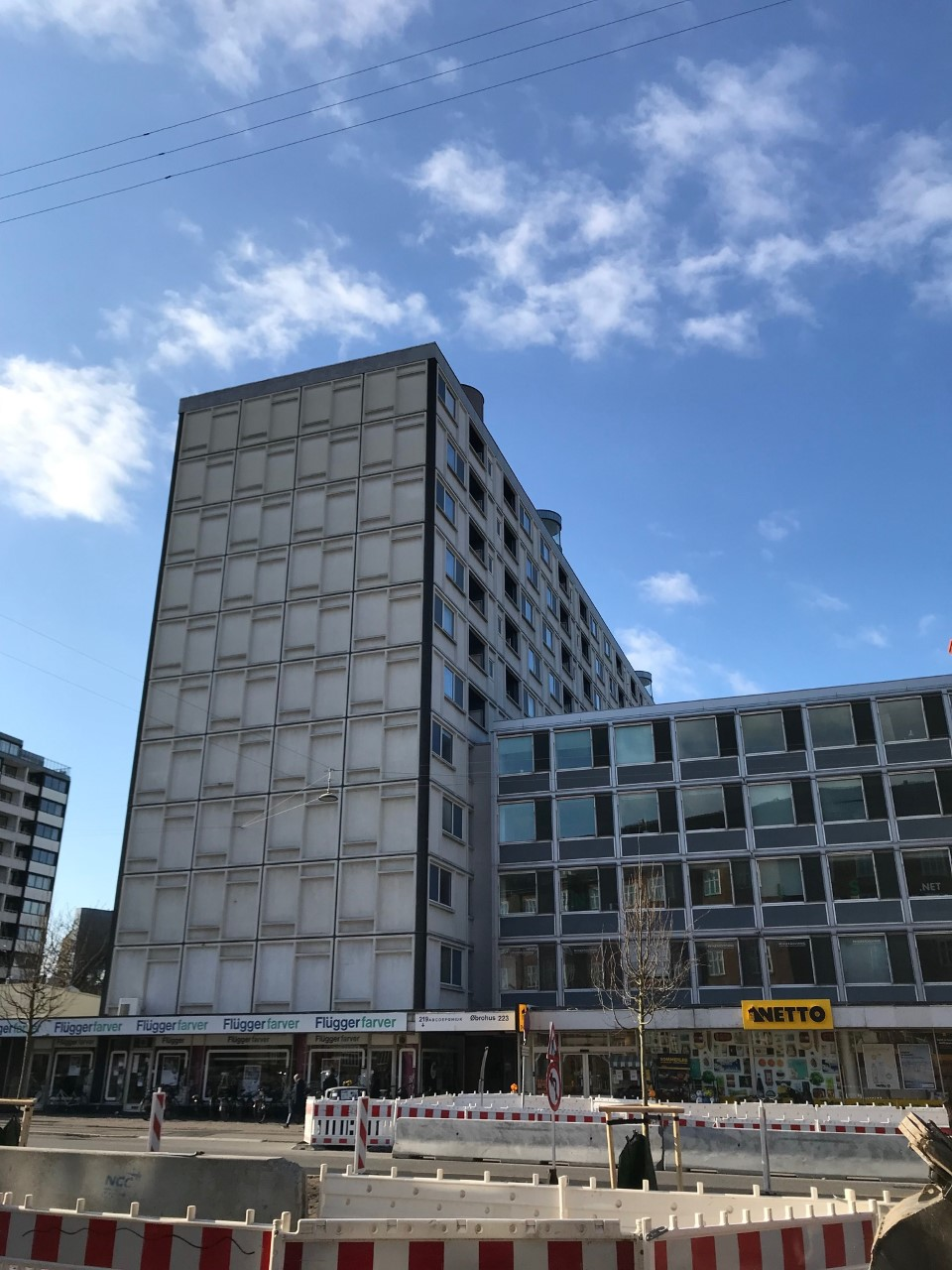 Øbrohus sydlige gavl. Fotograferet fra Jagtvej. April 2019